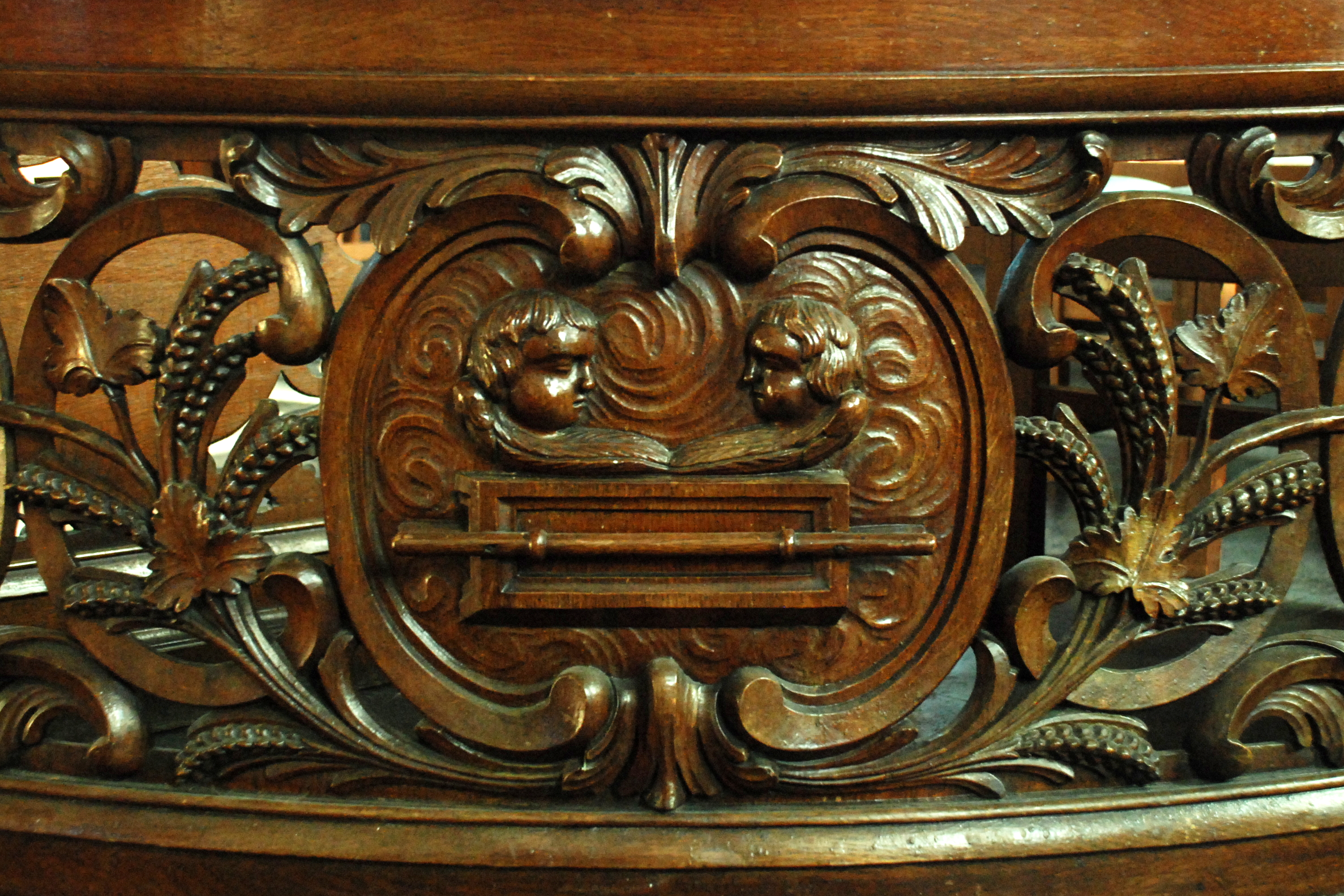 Belgique - Brabant wallon - Église de Court-Saint-Étienne